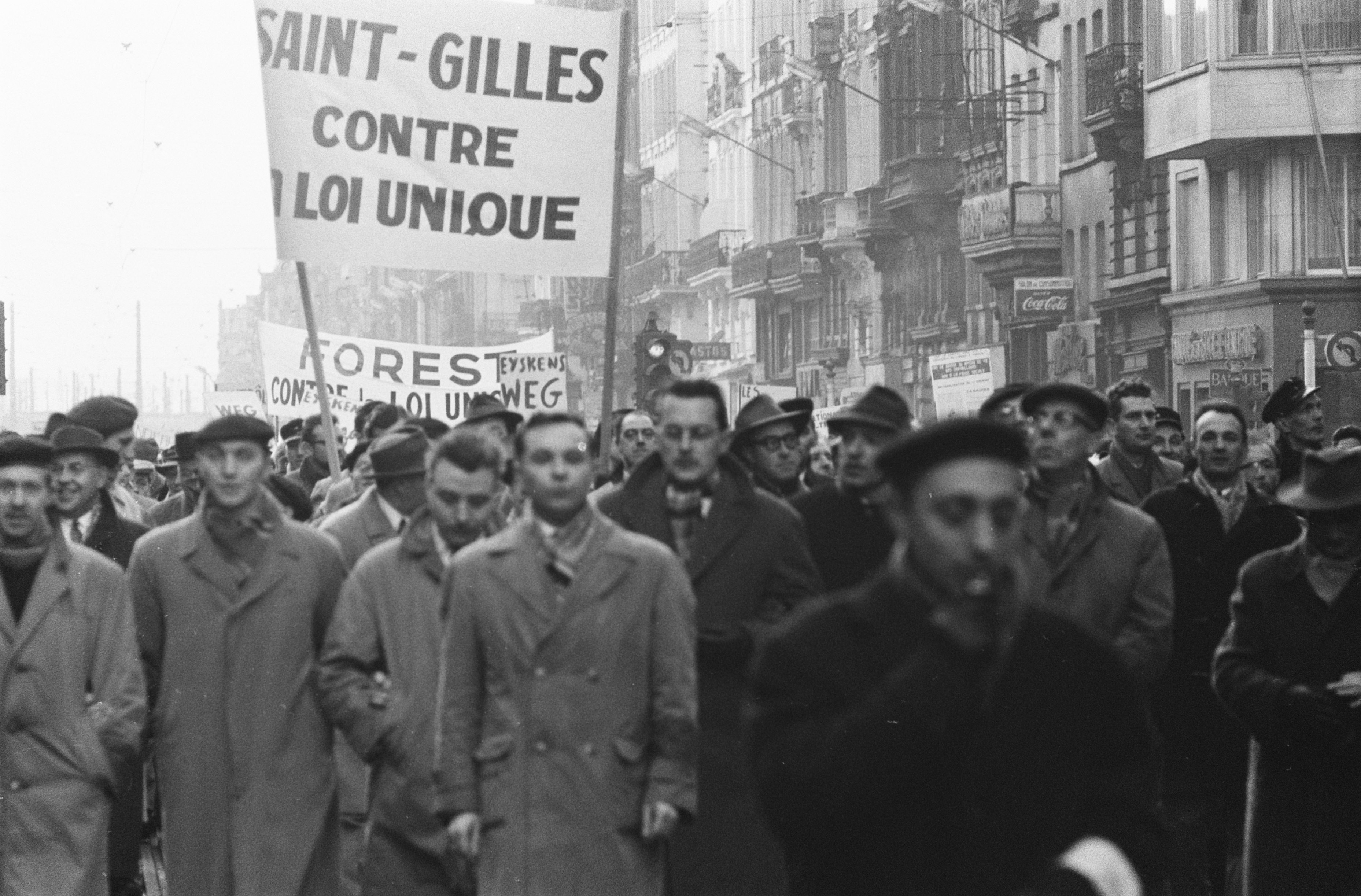 Collectie / Archief : Fotocollectie Anefo Reportage / Serie : [ onbekend ] Beschrijving : Demonstraties in Brussel tegen de Eenheidswet, demonstrerende stakers Datum : 3 januari 1961 Locatie : Brussel Trefwoorden : DEMONSTRATIES, stakers Fotograaf : Pot, Harry / Anefo Auteursrechthebbende : Nationaal Archief Materiaalsoort : Negatief (zwart/wit) Nummer archiefinventaris : bekijk toegang 2.24.01.05 Bestanddeelnummer : 911-9323